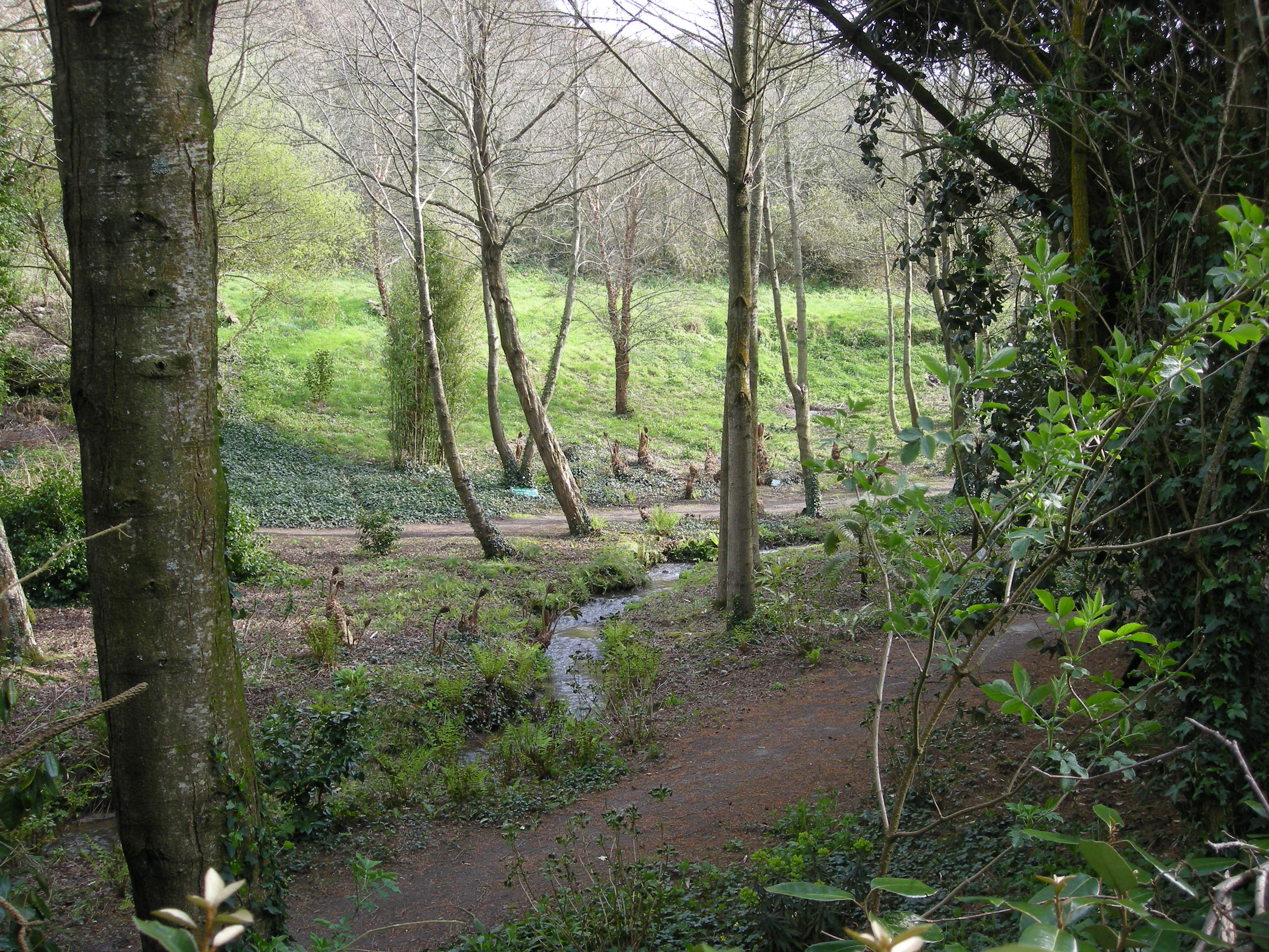 Jardin en hommage à Jacques Prévert à Saint-Germain-des-Vaux (Manche, Basse-Normandie, France).